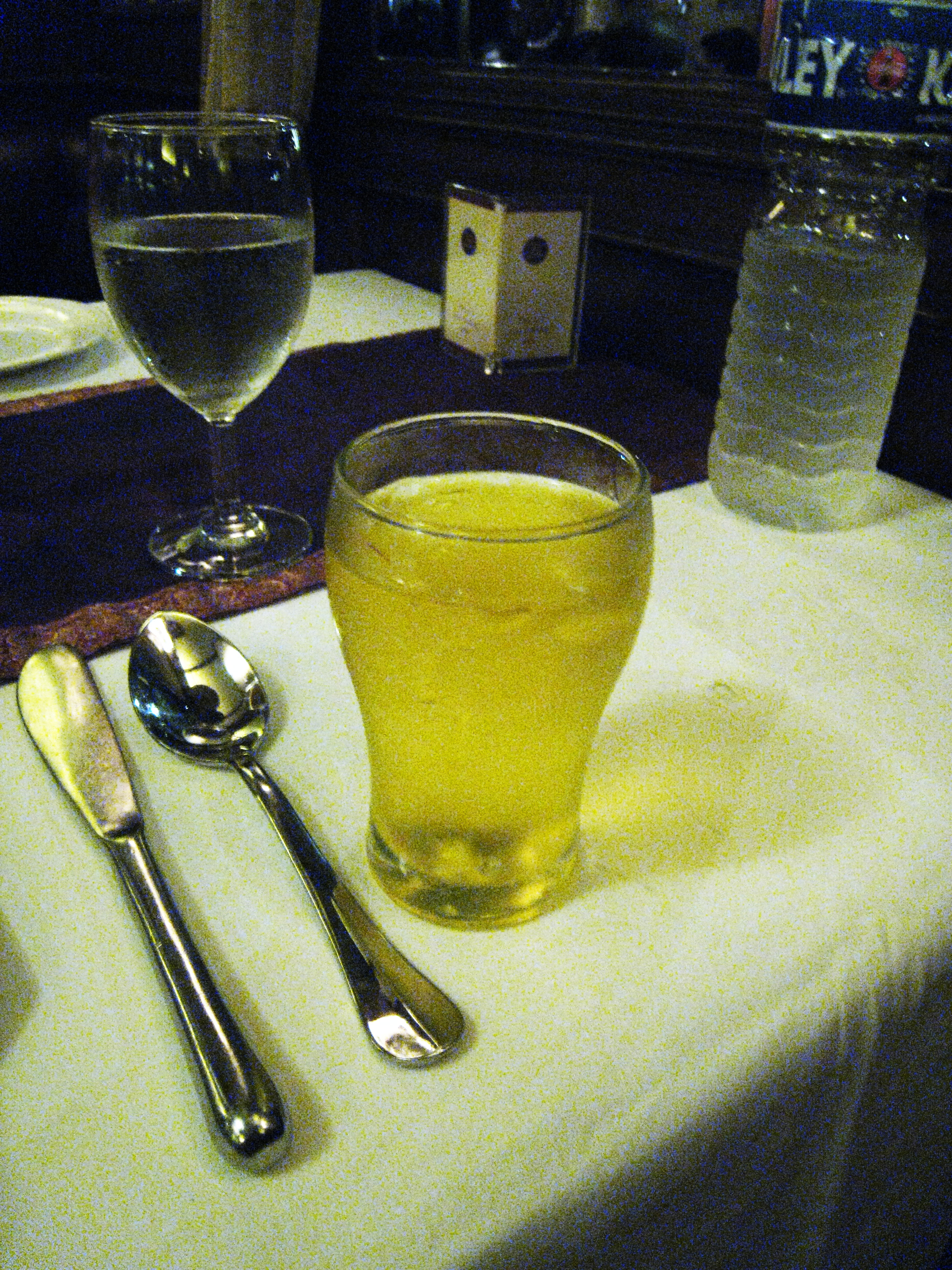 sahib sindh sultan saffron sharbat